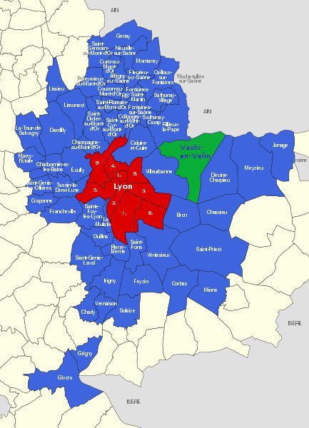 Communes du Grand Lyon, en vert Vaulx-en-Velin